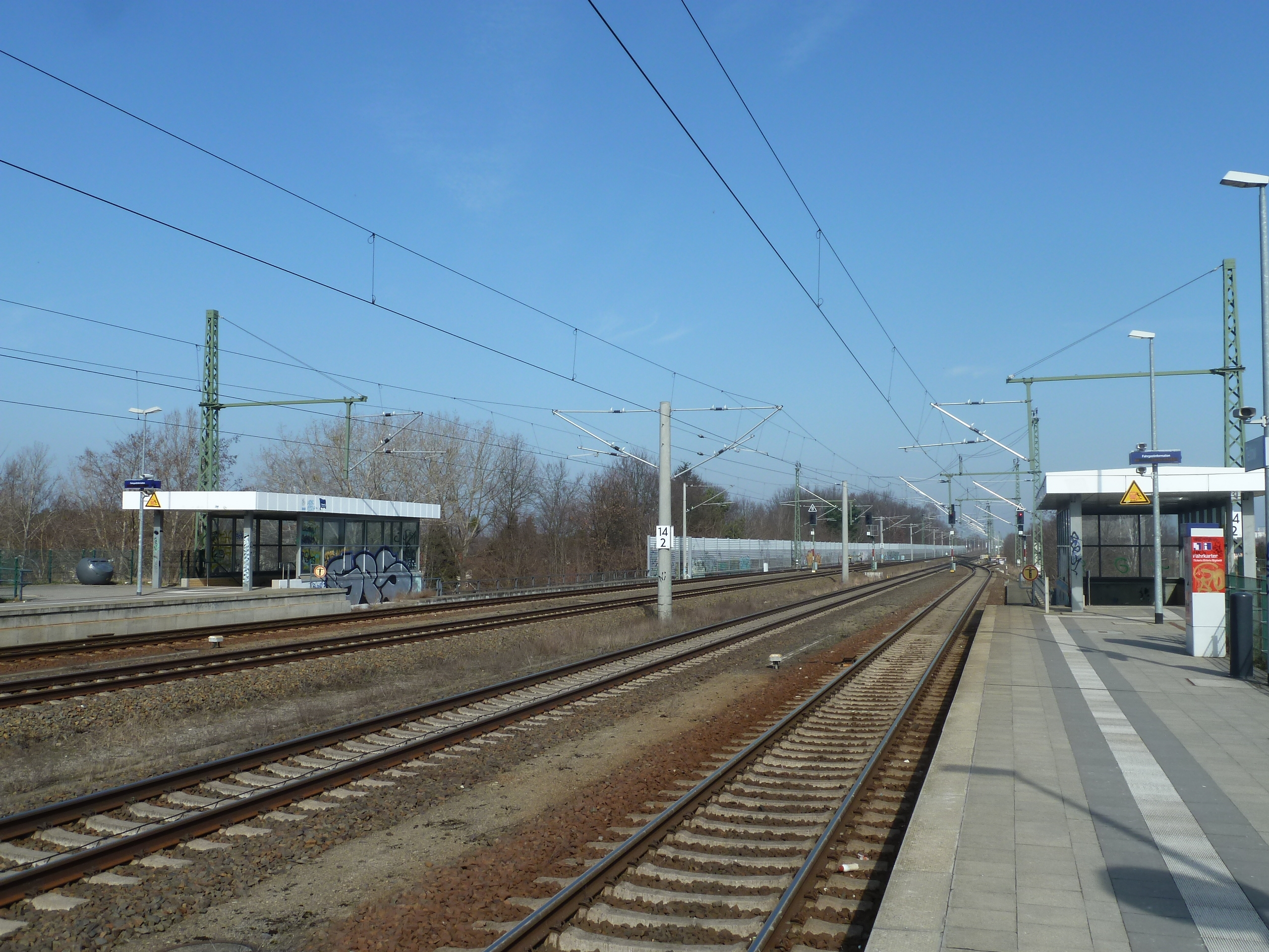 Bahnhof Teltow, Bahnsteig